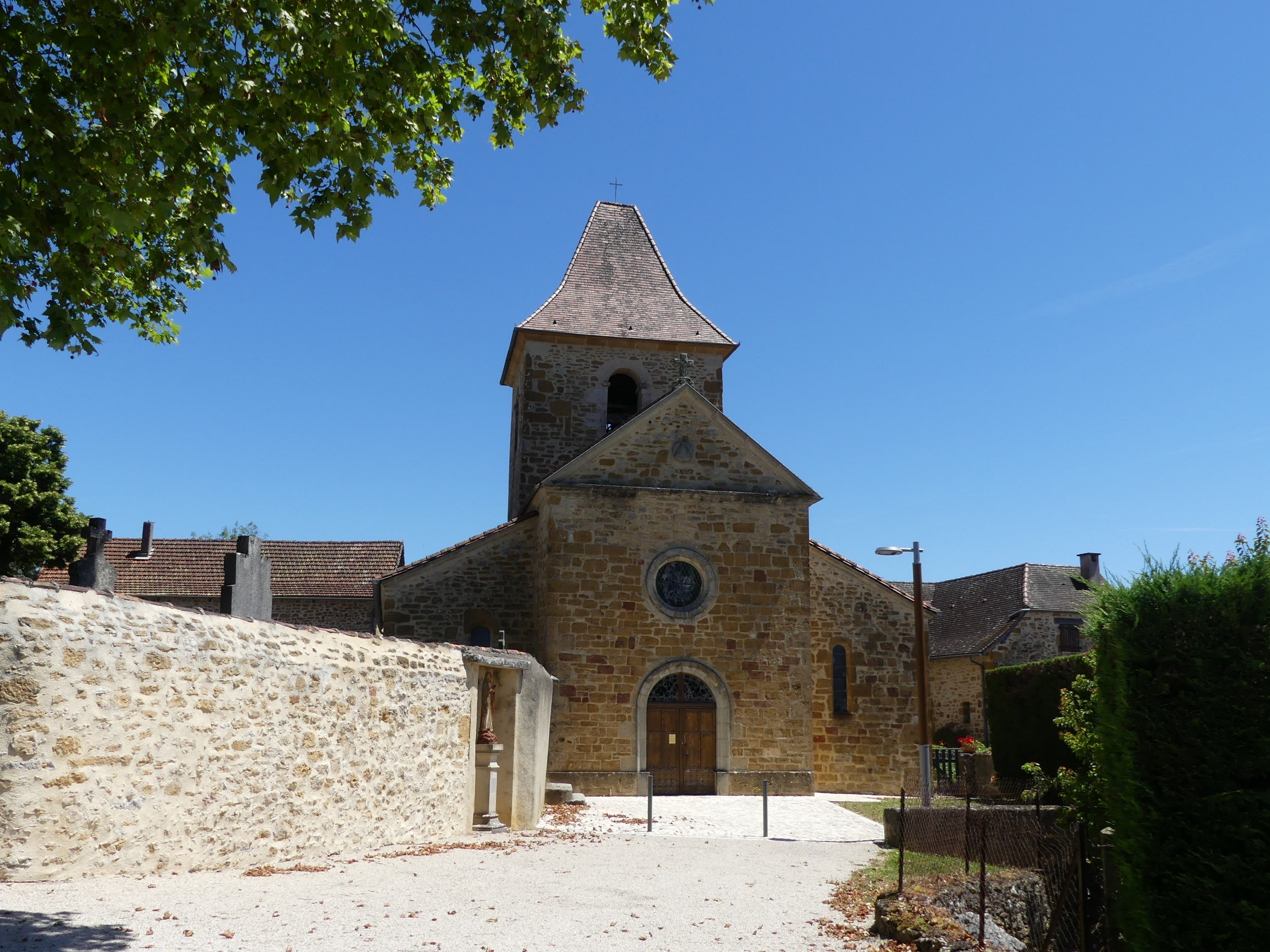 L'église de Cambes, Lot, France.